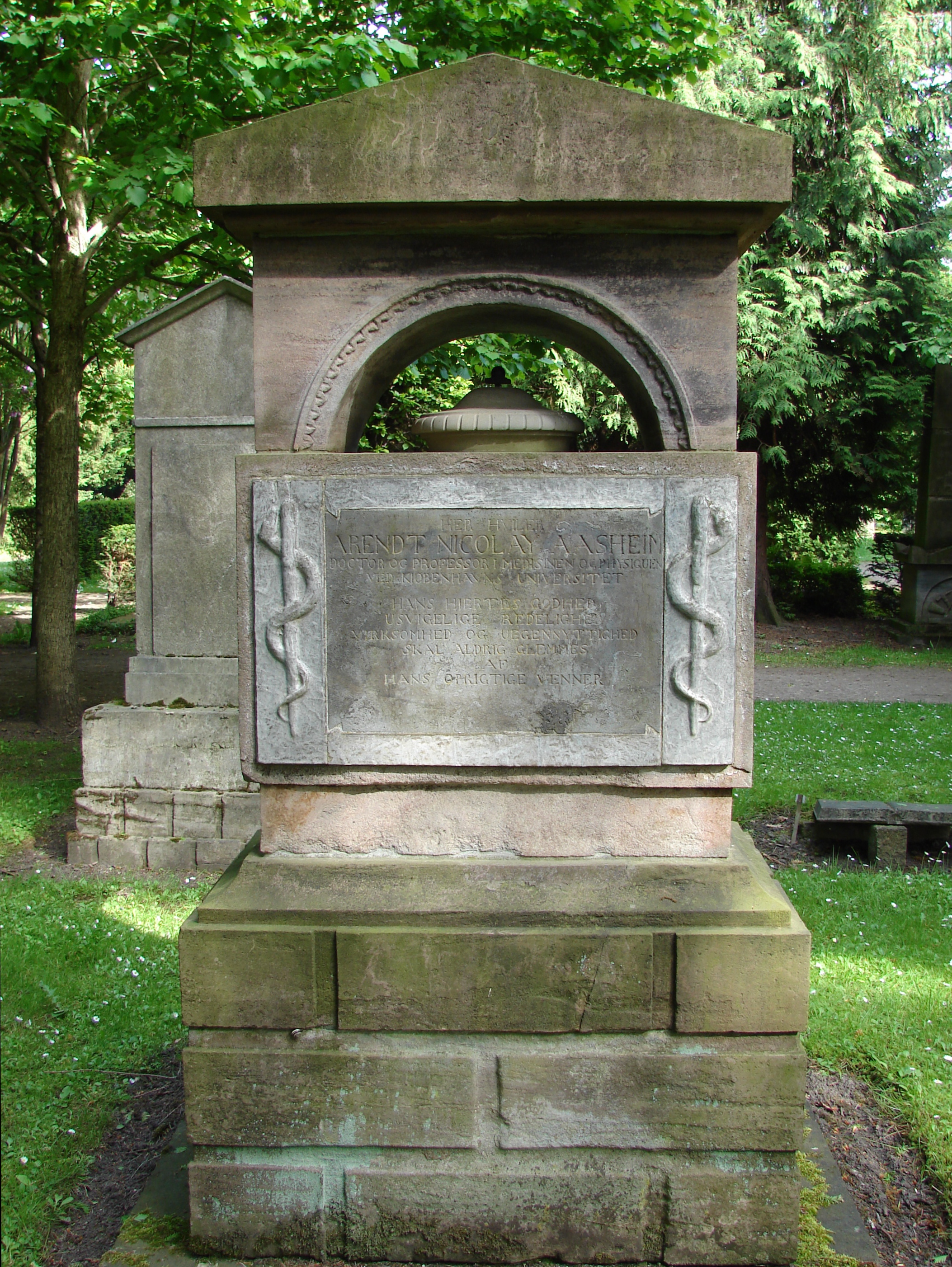 Her hviler Arendt Nicolay Aasheim, doctor og professor i medisinen og physiquen ved Kiøbenhavns Universitet. Hans hiertes godhed, usvigelige redelighed, virksomhed og uegennyttighed skal aldrig glemmes, af hans oprigtige venner. Gravminde på Assistens Kirkegård af Peter Leonhard Gianelli, Nørrebro, København